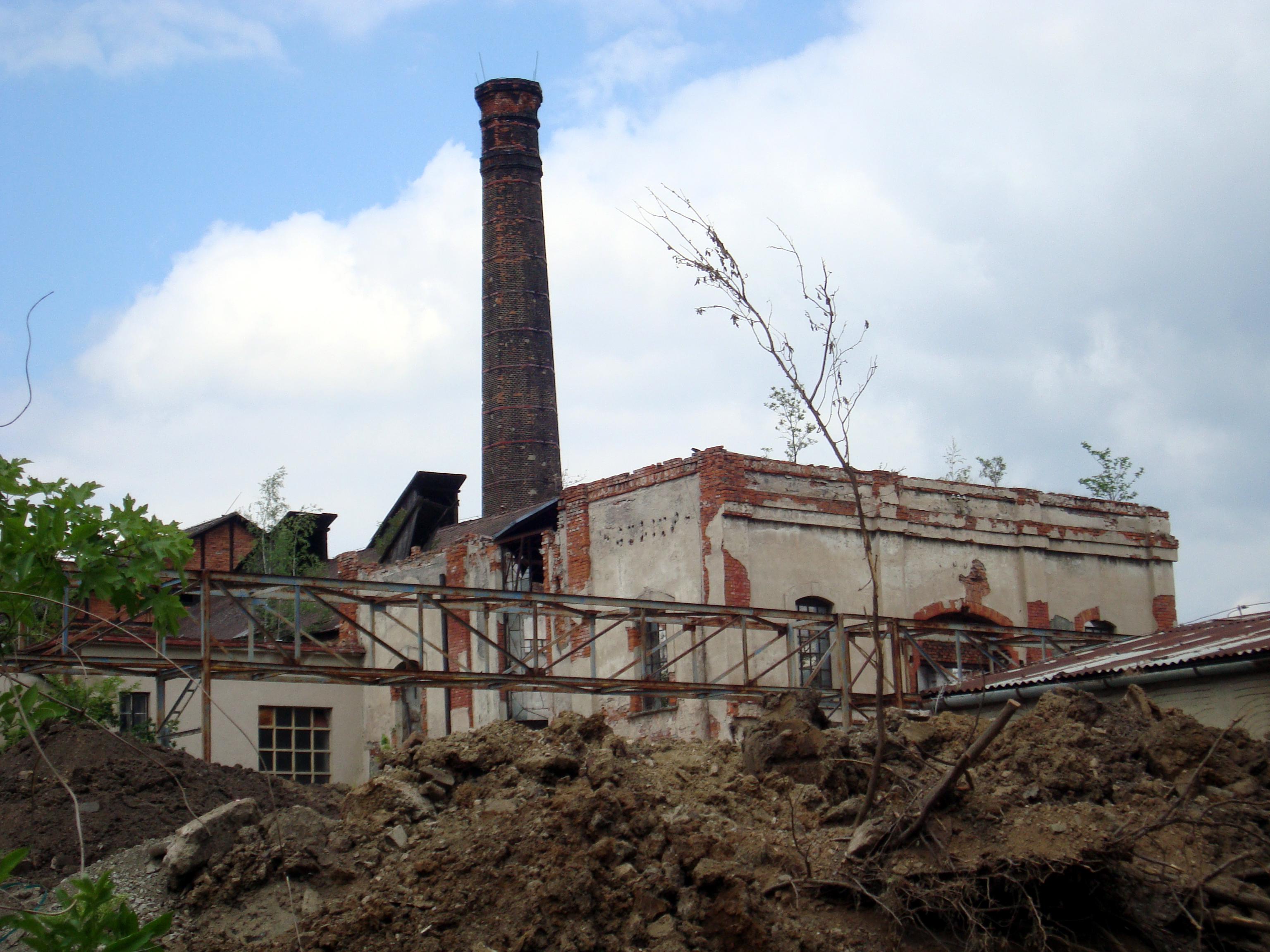 Zastávka bývalý důl Julius